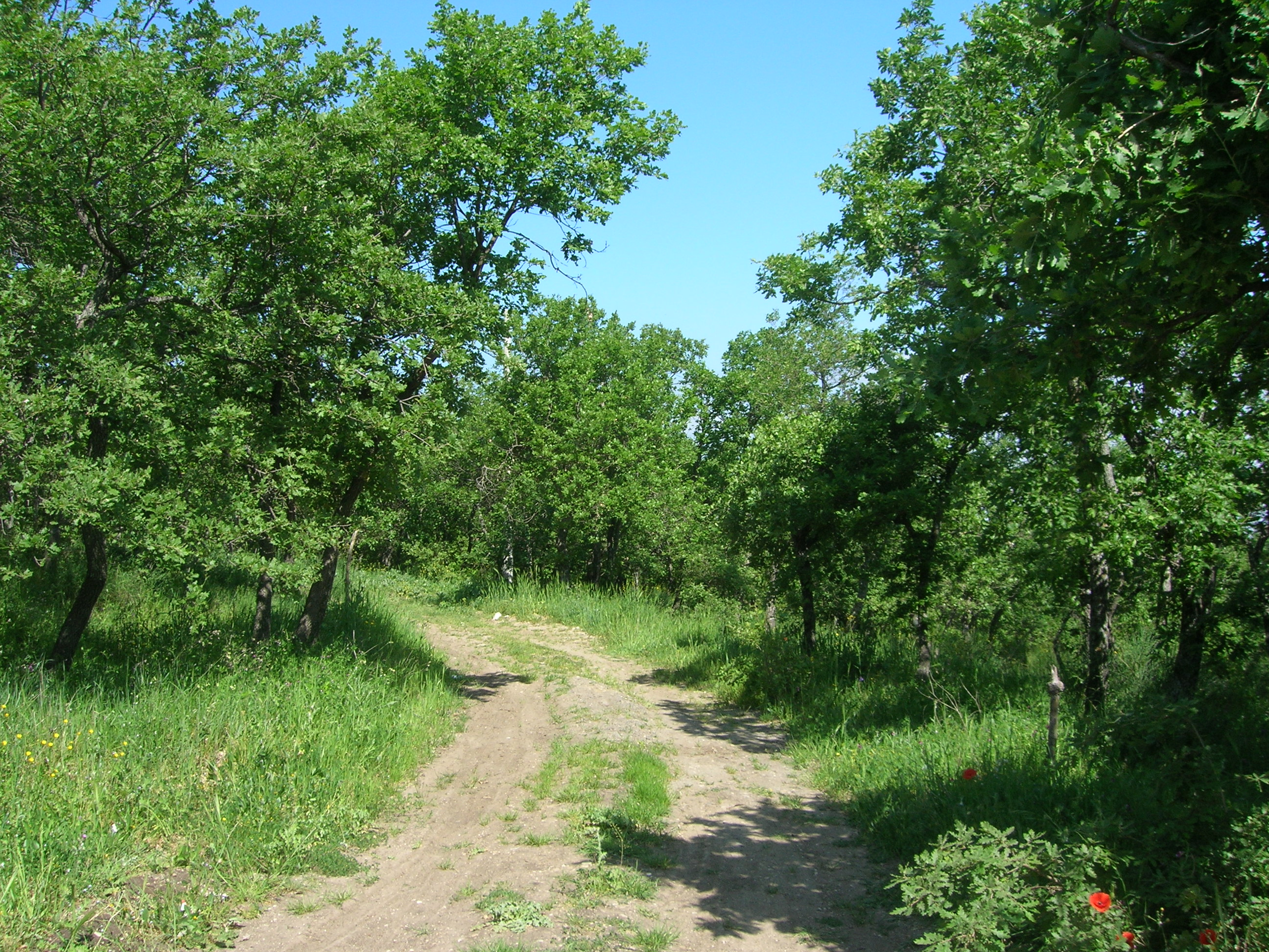 Bosco di Venosa (PZ)